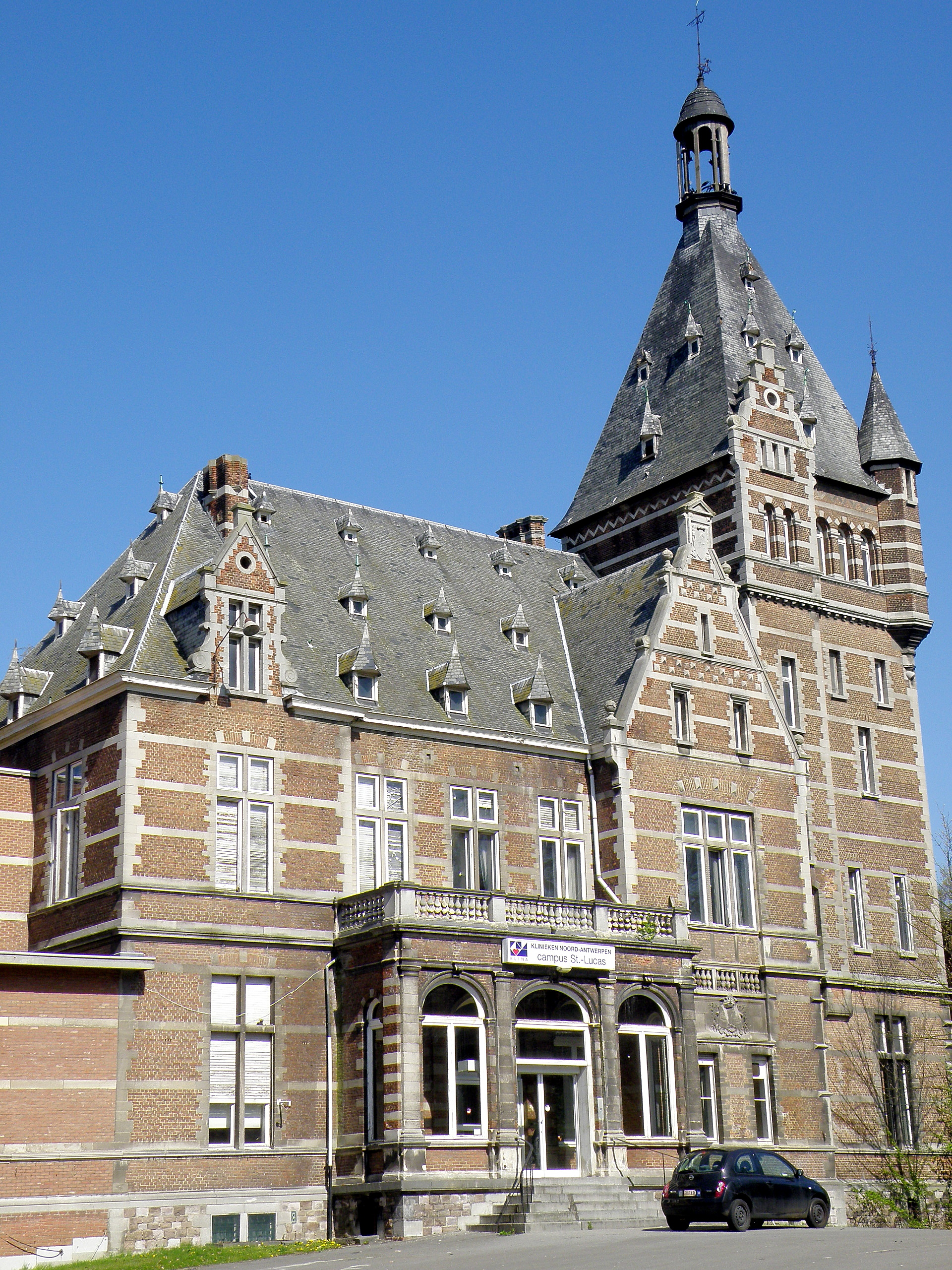 Antwerpen, district Ekeren. Voorm. Sint-Lucaskliniek, voorheen Hof van Delft, bouwjaar 1903, n.o.v. Henri en Leonard Blomme. (Z.-O.) voorgevel. Afbraak gepland wschl. zomer 2010.Vgl. verder Inventaris Bouwkundig Erfgoed Vlaanderen.